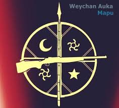 Logo utilizado por el grupo armado mapuche Weichan Auka Mapu, comúnmente hallado en panfletos cerca de lugares que ataco.